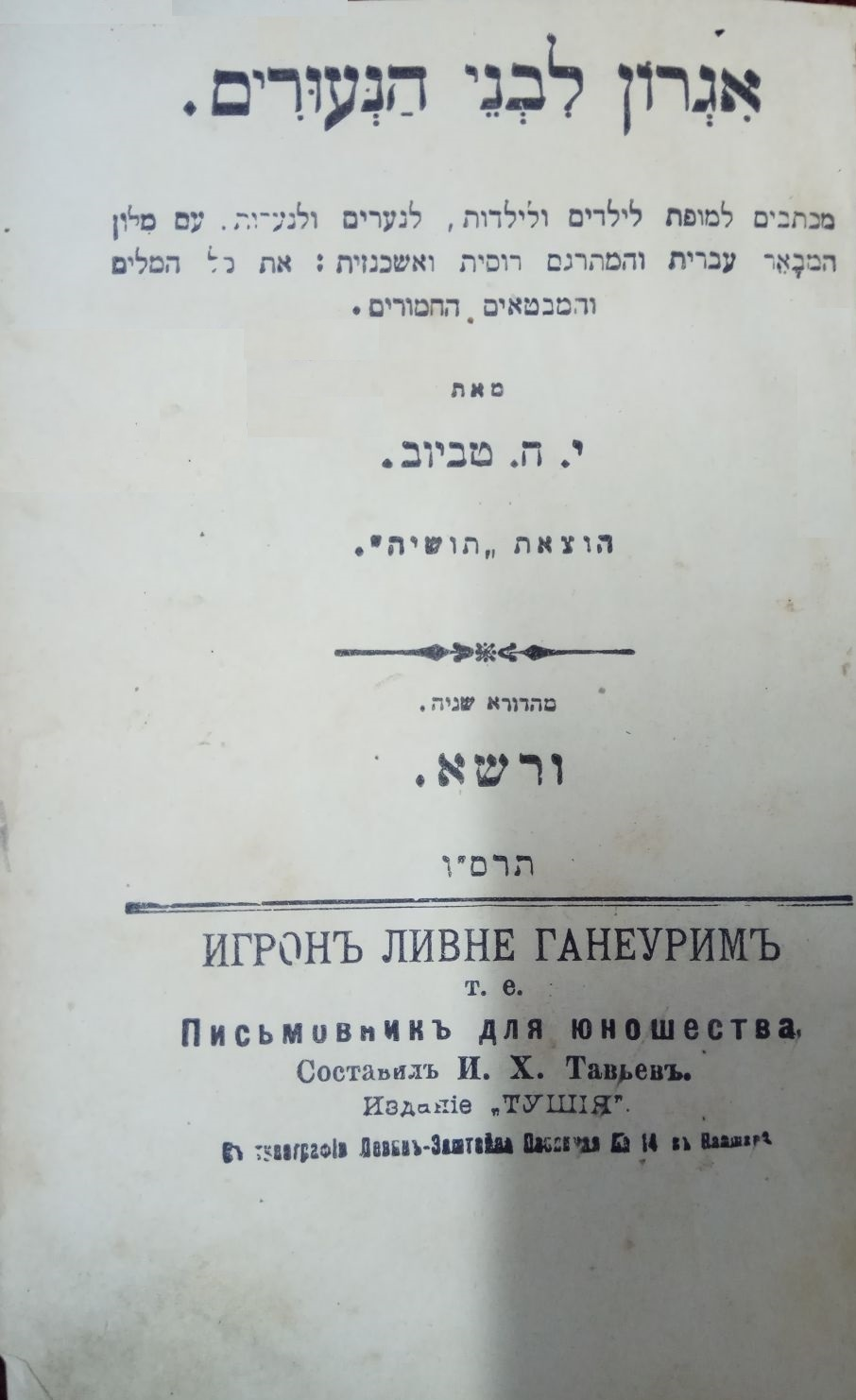 שער הספר "אגרון לבני הנעורים" מאת ישראל חיים טביוב